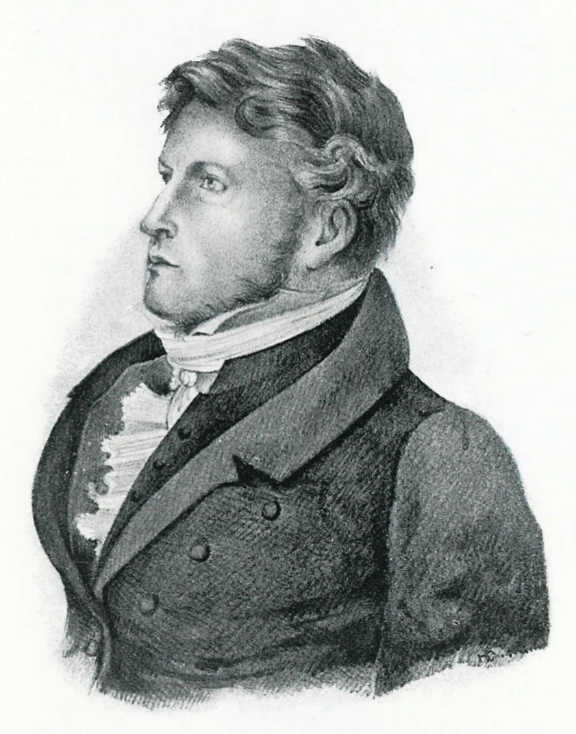 Wilhelm Snell